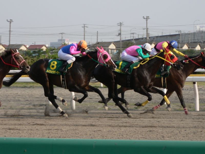 メイショウボーラー（第17回かしわ記念）